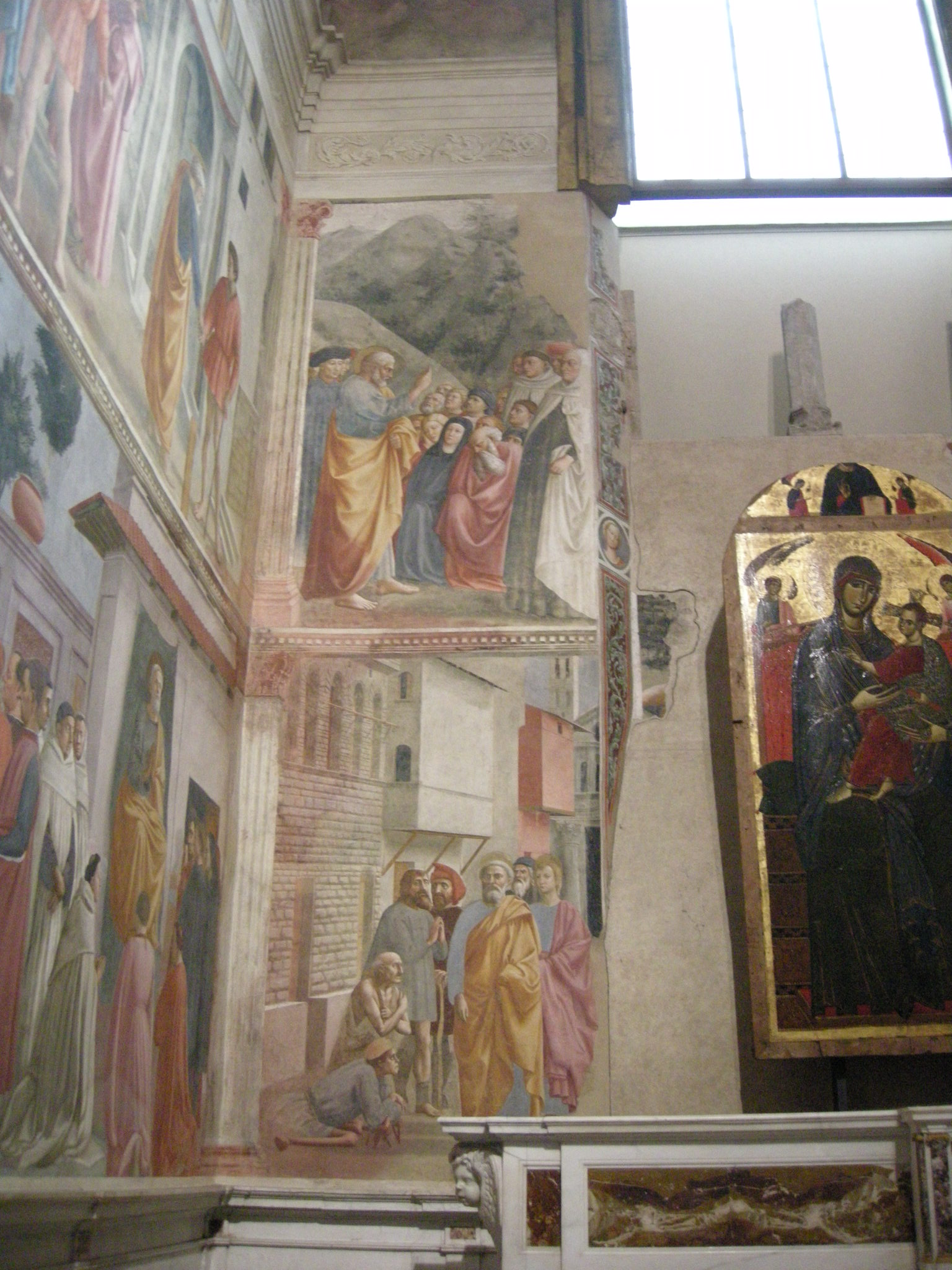 Cappella brancacci, parete ovest